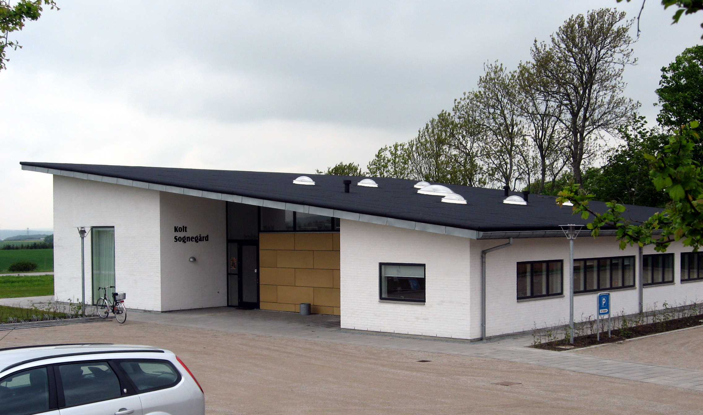 Kolt Sognegård at Kolt Kirke in Kolt Sogn, Århus Kommune, Denmark.